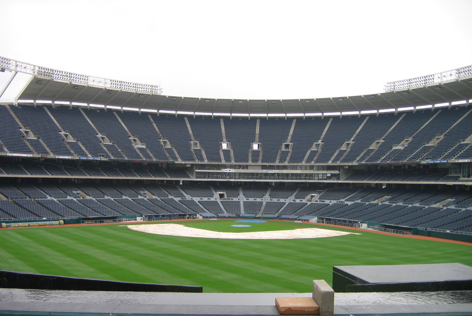 Kauffman Stadium 02:04, 30 March 2007 . . Greenstrat . . 1600×1071 (303,211 bytes)